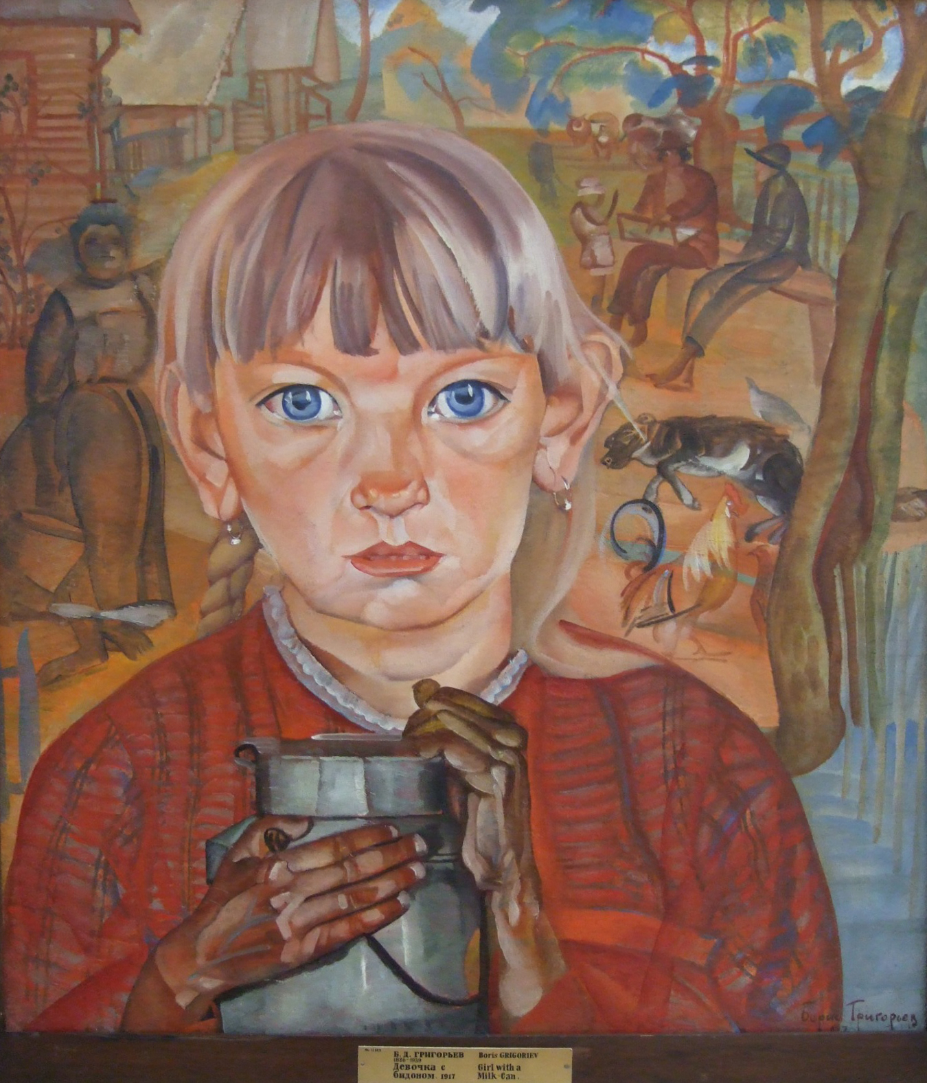 Девочка с бидоном. Из цикла "Расея". 1917. Масло Girl with a milk can, 1917, Oil